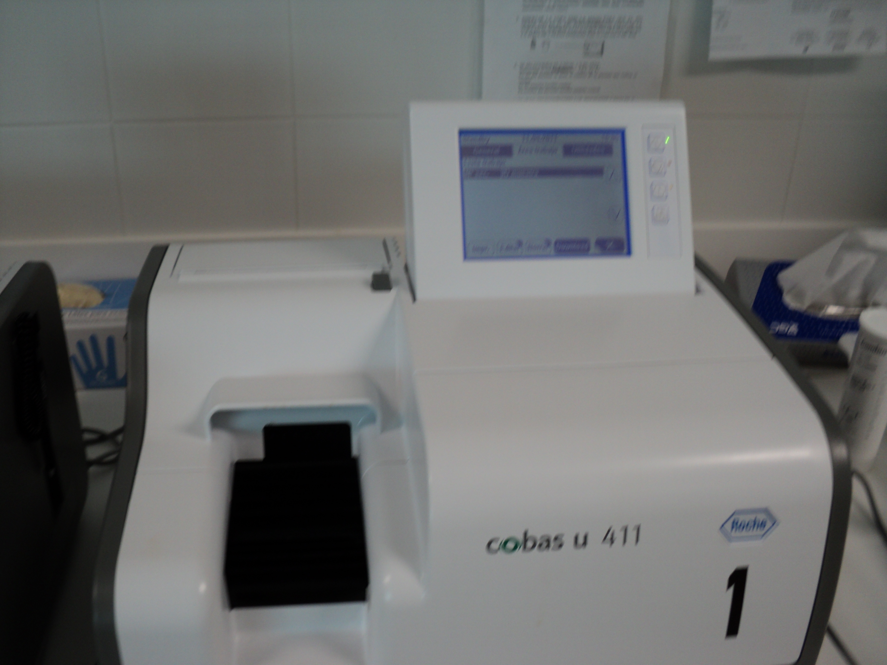 autoanalizador marca Cobas de tiras reactivas de orina. Se usa como lector de una prueba de screening